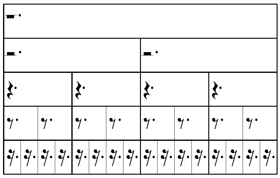 Description : Silences pointés Source : Personnelle Licence : GFDL